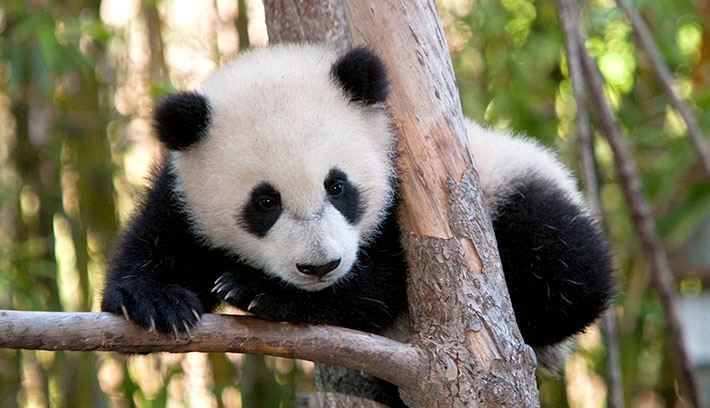 Panda También conocido como oso del bambú por habitar principalmente en los fríos y húmedos bosques que poseen este tipo de planta al este del Tíbet y sudoeste de China. El oso panda es un mamífero que debe su nombre a la etimología científica Ailuropoda melanoleuca, que significa carnívoro, de color blanco y negro.